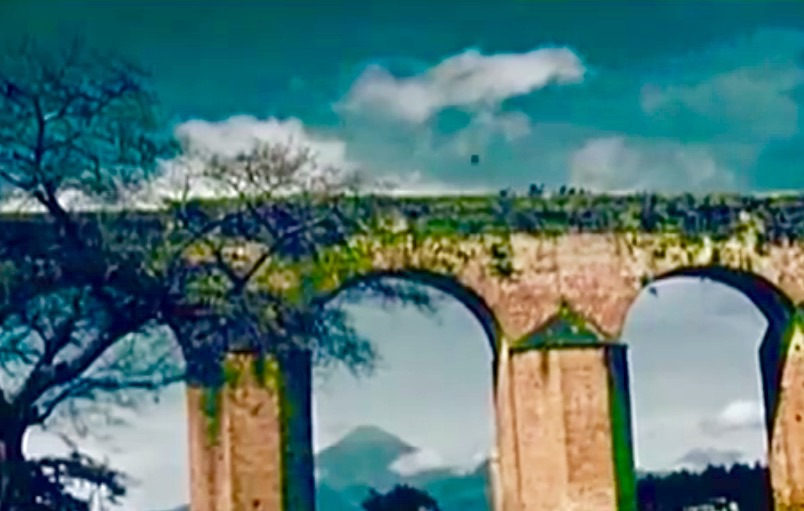 Acueducto colonial de la Ciudad de Guatemala.